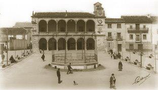 La vieja Plaza de villarrobledo